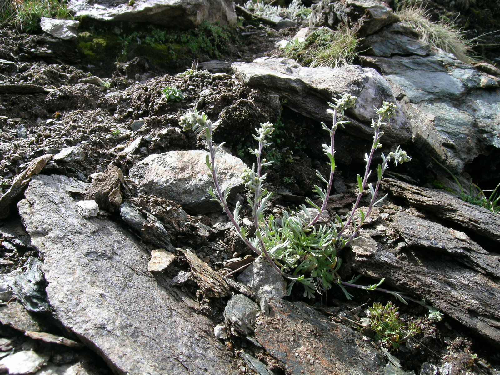 Artemisia genipi Zermatt, Riffelberg (Kanton Wallis, Switzerland), 2500 m Author: Roland Teuscher – own photograph Date: 3.08.06